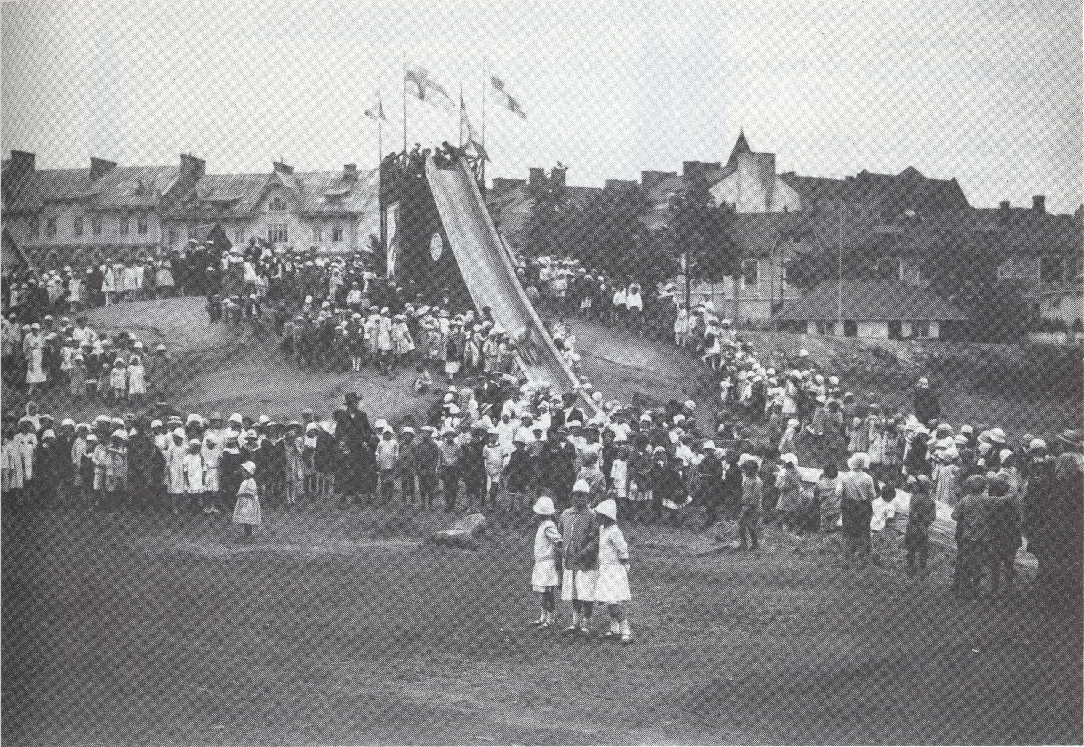 Liukumäki vuoden 1920 messuilla Johanneksen kentällä